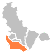 福州市区中南台岛（橙色）的位置